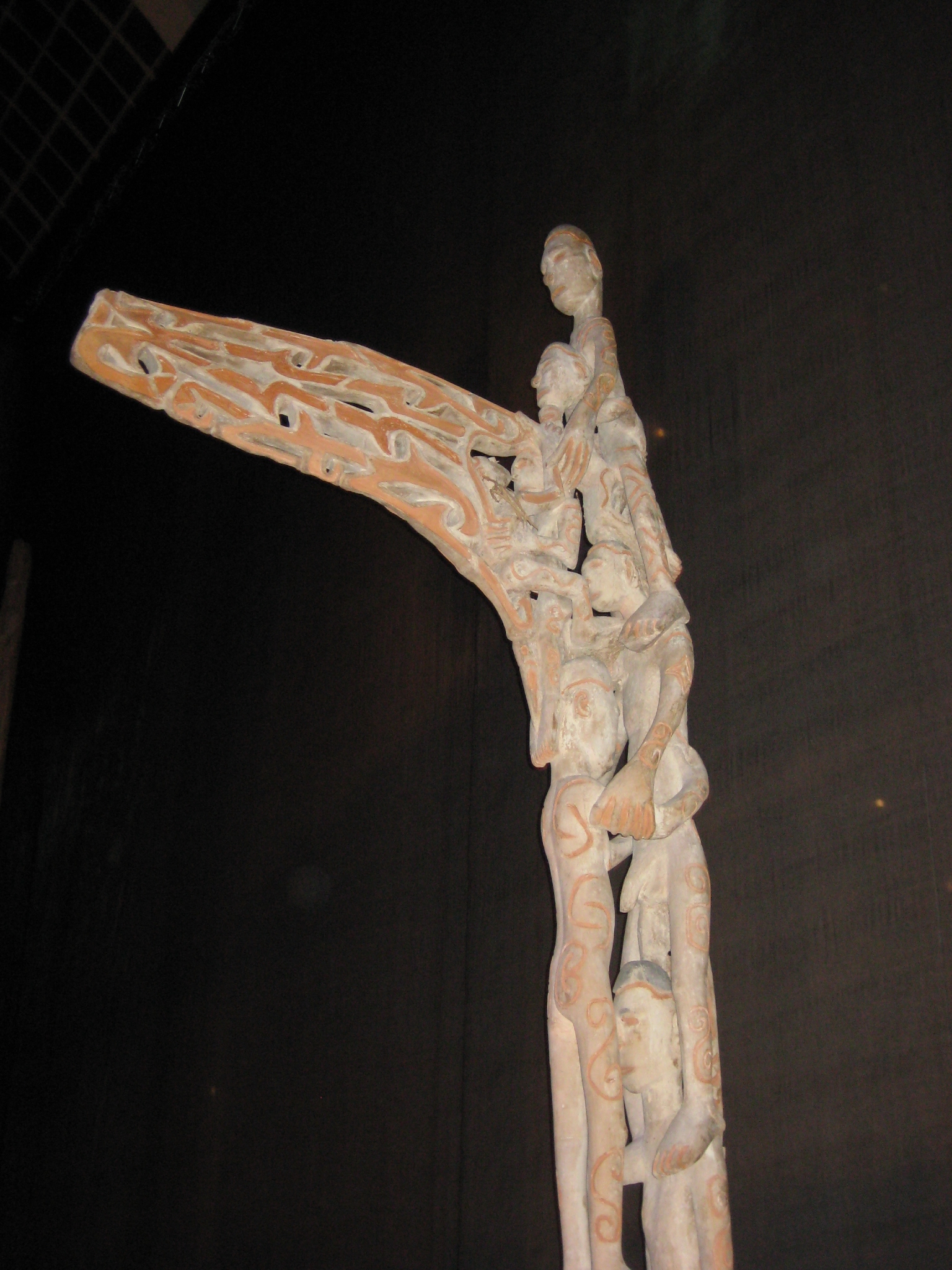 Bisjpaal